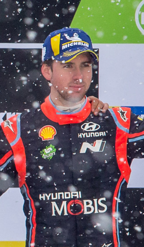 Podium Rajdu Szwecji 2018